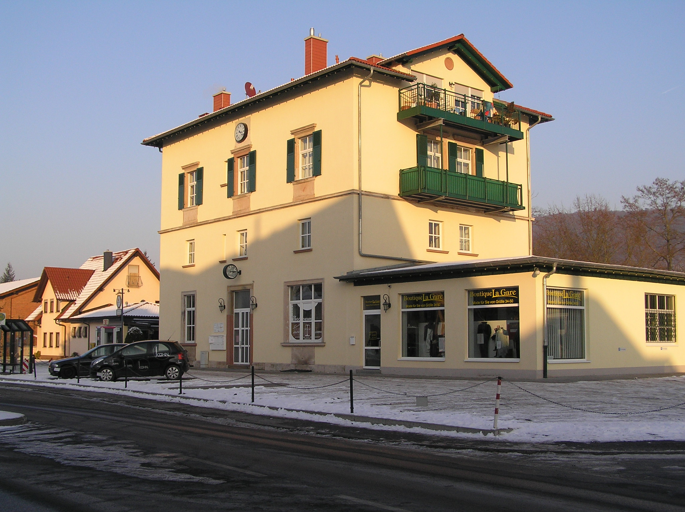 Der Bahnhof von Kleinwallstadt im Winter